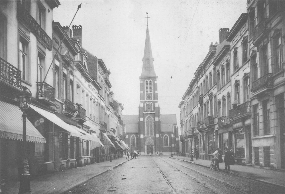 Rue Général Leman - Église Sainte-Gertrude (avant 1920) - today place van Meyel Commune d'Etterbeek, Après 25 années de Pouvoir, 1907 (biblioth. BDU/BSO)